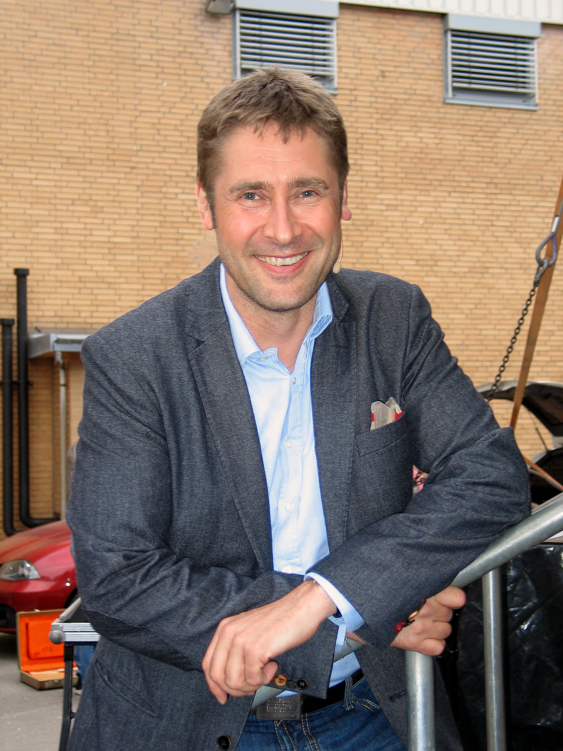 Zwischen seinen Moderationen auf der Bühne zum "Tag des offenen Kraftwerks" 2013 auf dem Gelände des Heizkraftwerks Linden fand der Entertainer Detlef Simon alias Desimo sowie der Dokumentar-"Fotograf im Dauerlauf" (im Bild nicht zu sehen) endlich einmal kurz Zeit für einen ersten Schnappschuss ...